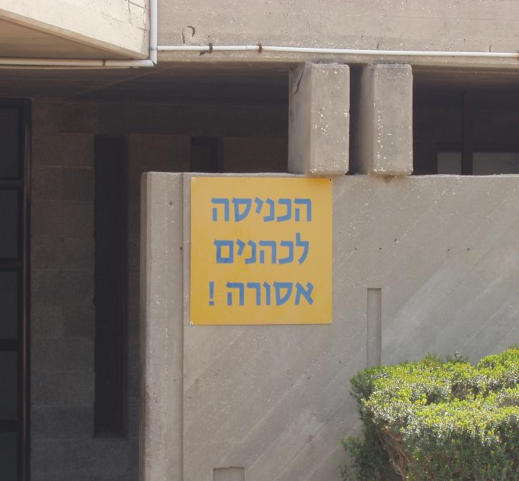 בבית העלמין בחולון. צילם דוד שי.